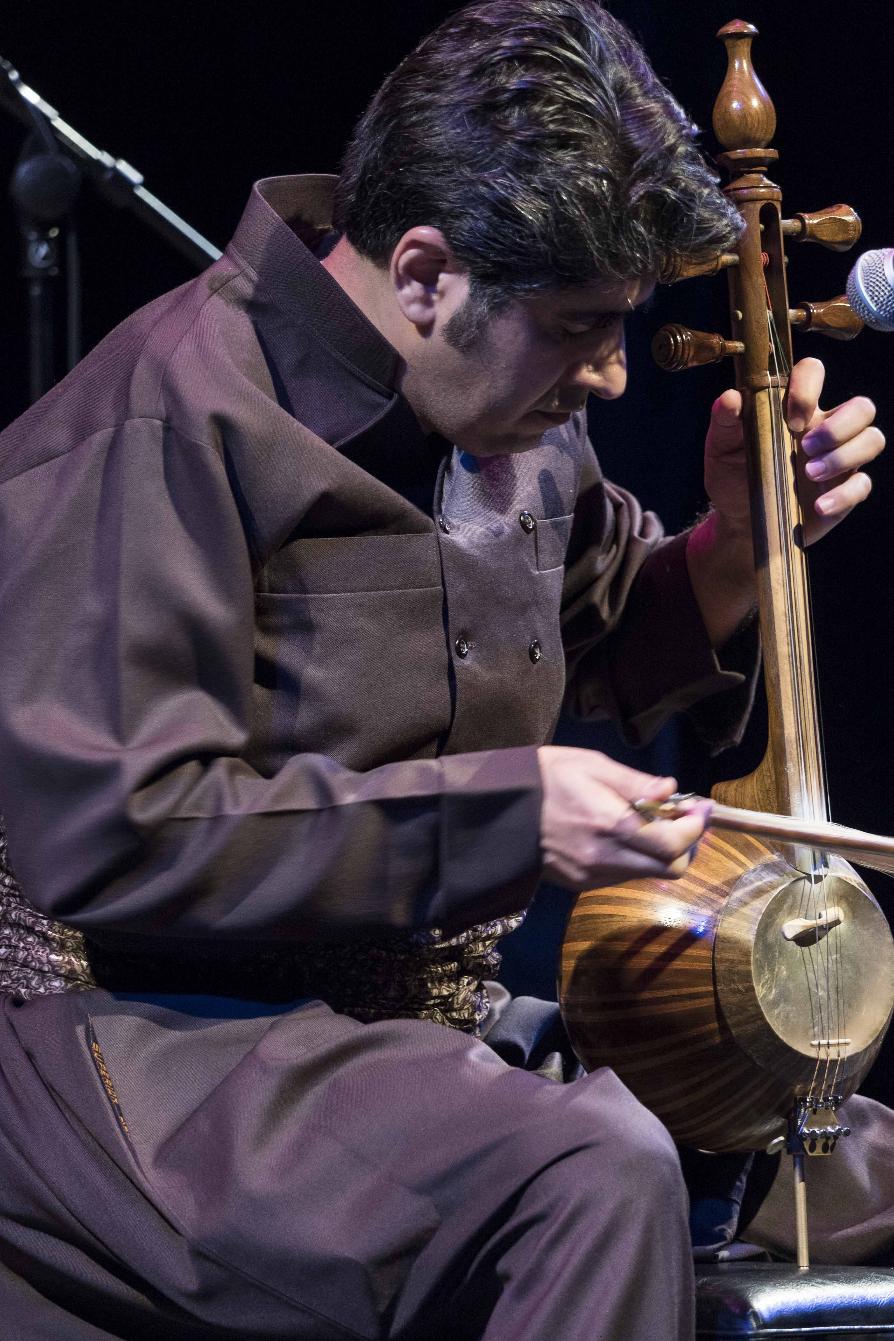 کمانچه‌ نوازی شهریار جمشیدی در کنفرانس آنتاریو کانتکت 2016